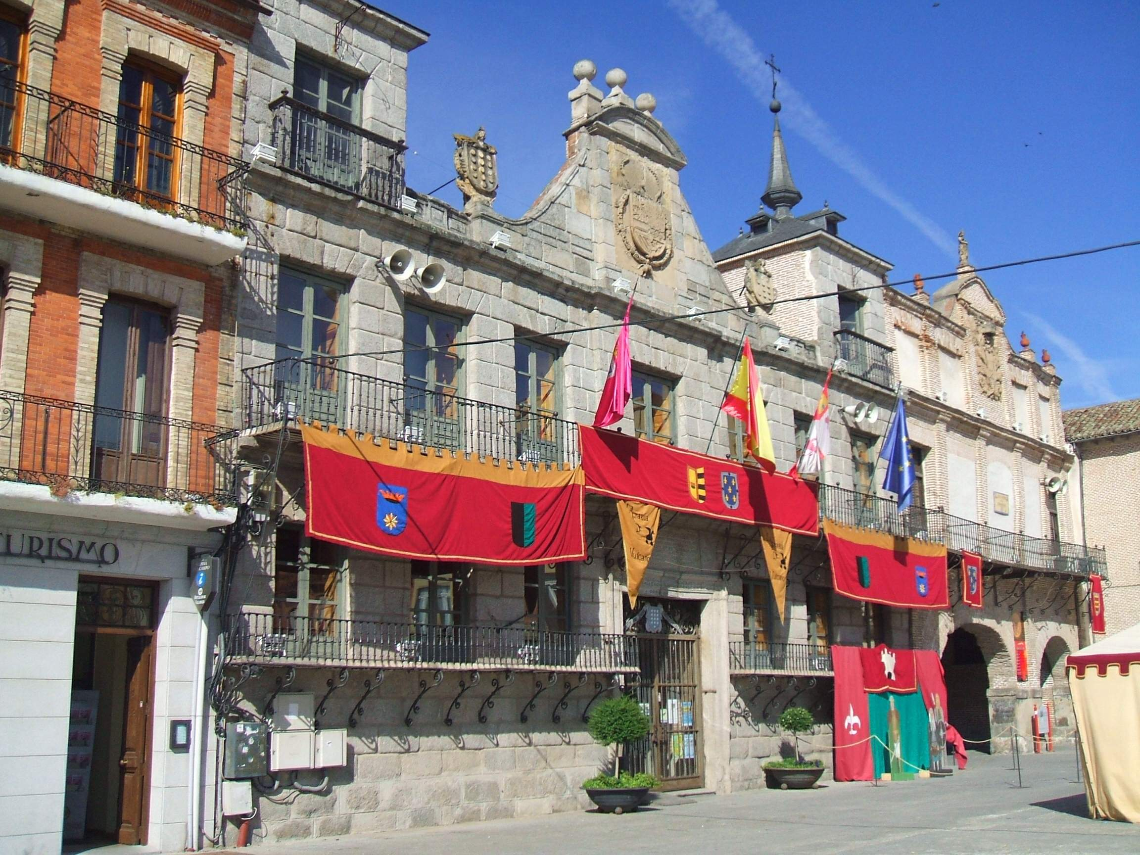 Ayuntamiento de Medina del Campo